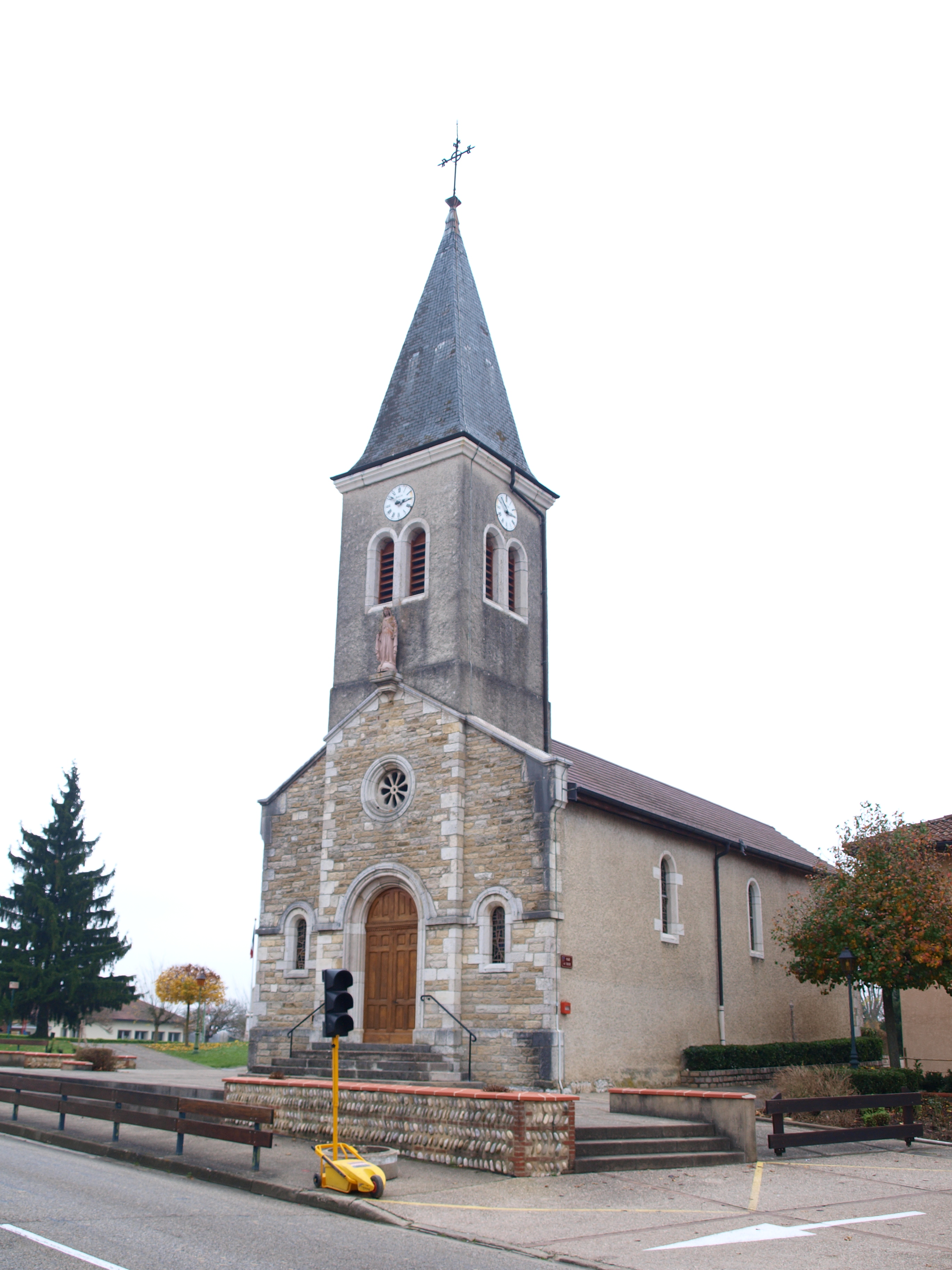 Servas (Ain, France) ; église